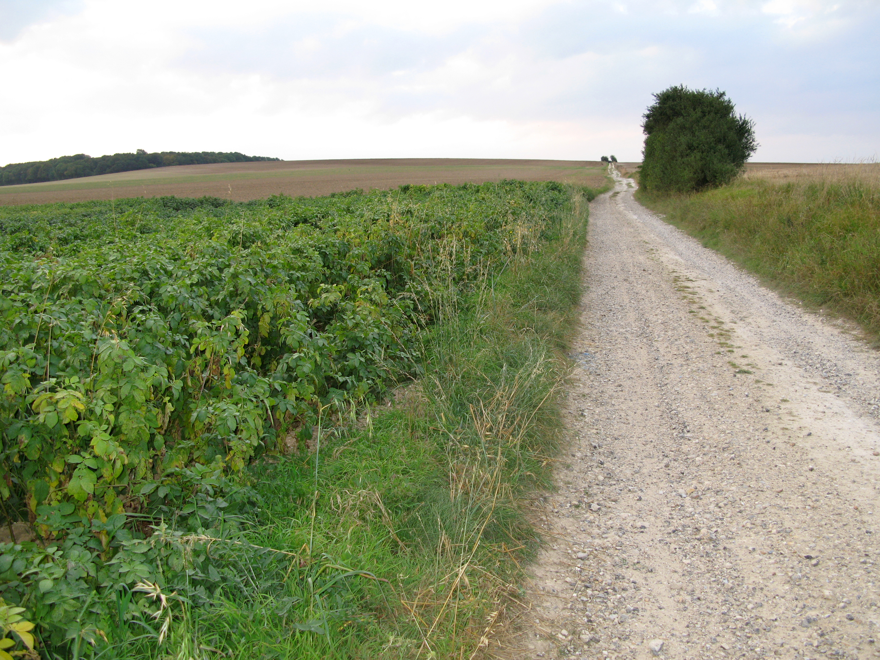 Surcamps (Somme, France) - L'ancienne voie romaine, appelée «Chaussée Brunehaut», entre Surcamps et Saint-Ouen. Il reste à définir si les champs apparaissant sur cette vue appartiennent effectivement au territoire de la commune de Surcamps (au-delà de la montée du chemin, au bout de l'horizon) ou à celui de Saint-Ouen, village auquel le photographe tourne le dos.